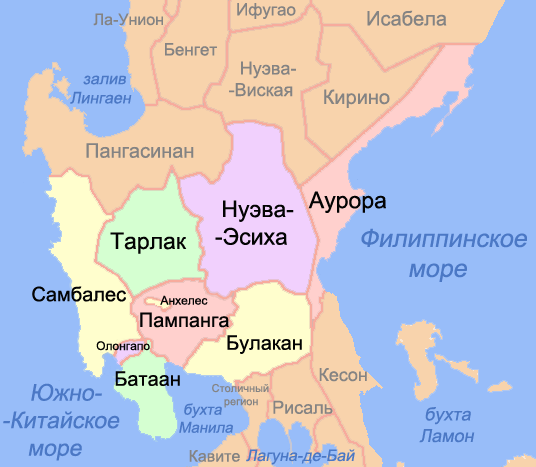 Карта провинций региона Центральный Лусон (Филиппины)